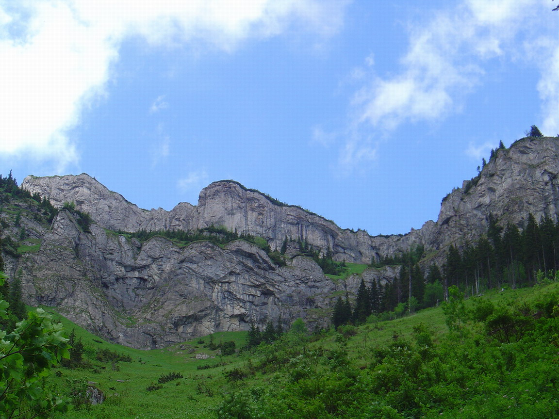 Skalne vrata from Dolina Siedmich prameňov